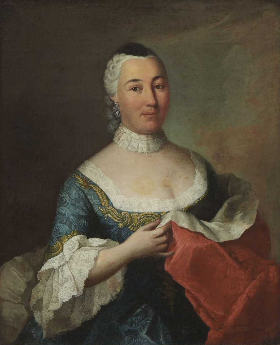 Portrait of Duchess Sophie Caroline Marie of Brunswick-Wolfenbüttel (1737-1817), Margravine of Brandenburg-Bayreuth